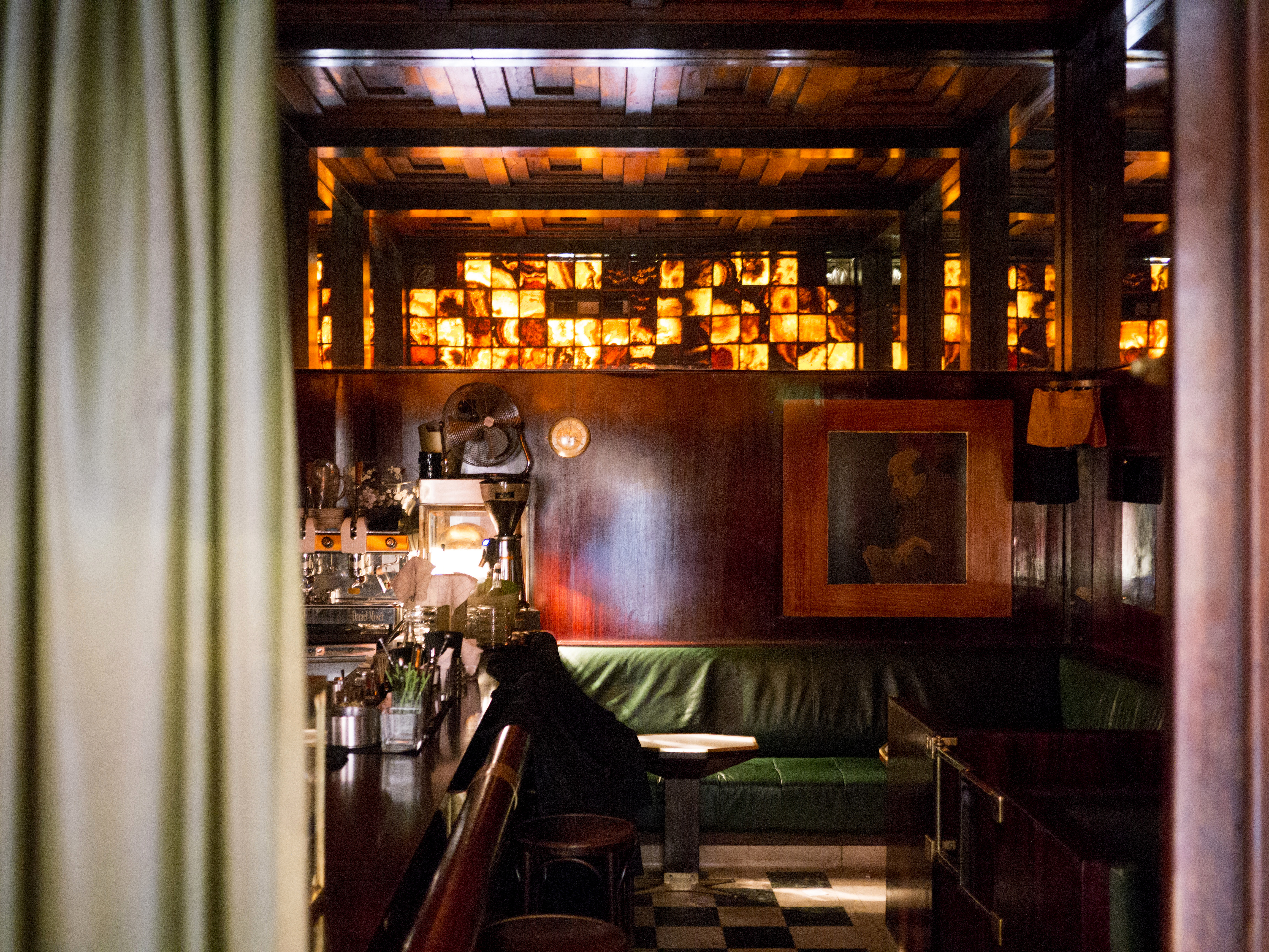 American Bar Adolf Loos Blick durch das Fenster